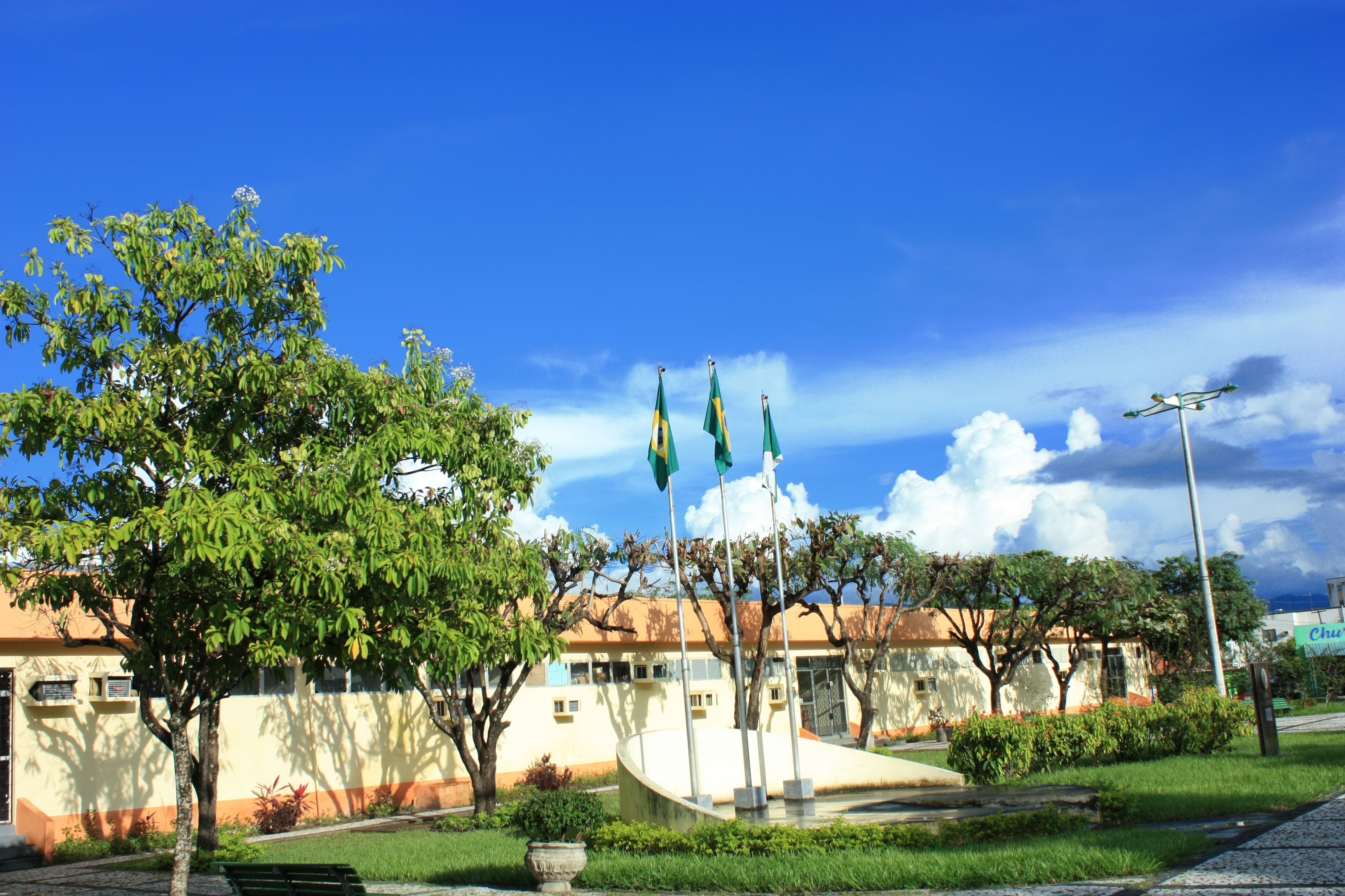 Vista da Prefeitura Municipal de Maranguape.